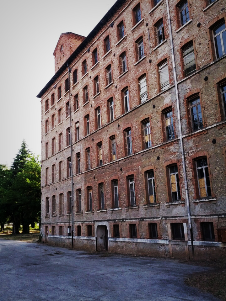 Edificio "Fabbrica Alta" - Area ex Lanerossi This is a photo of a monument which is part of cultural heritage of Italy.